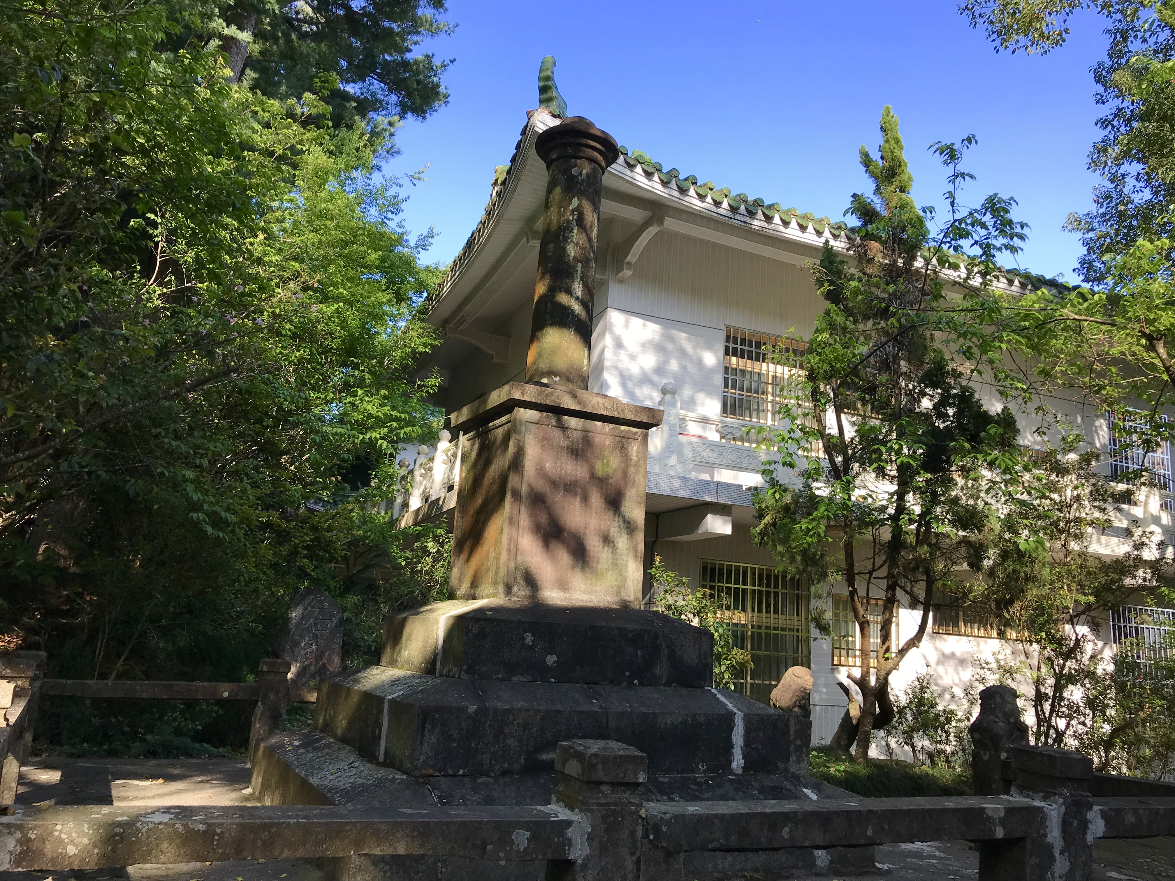 中文（台灣）: 大湖開發紀念碑